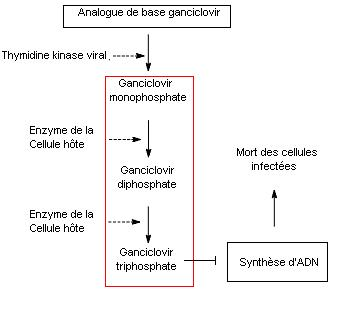 mecanisme d'action antiviral